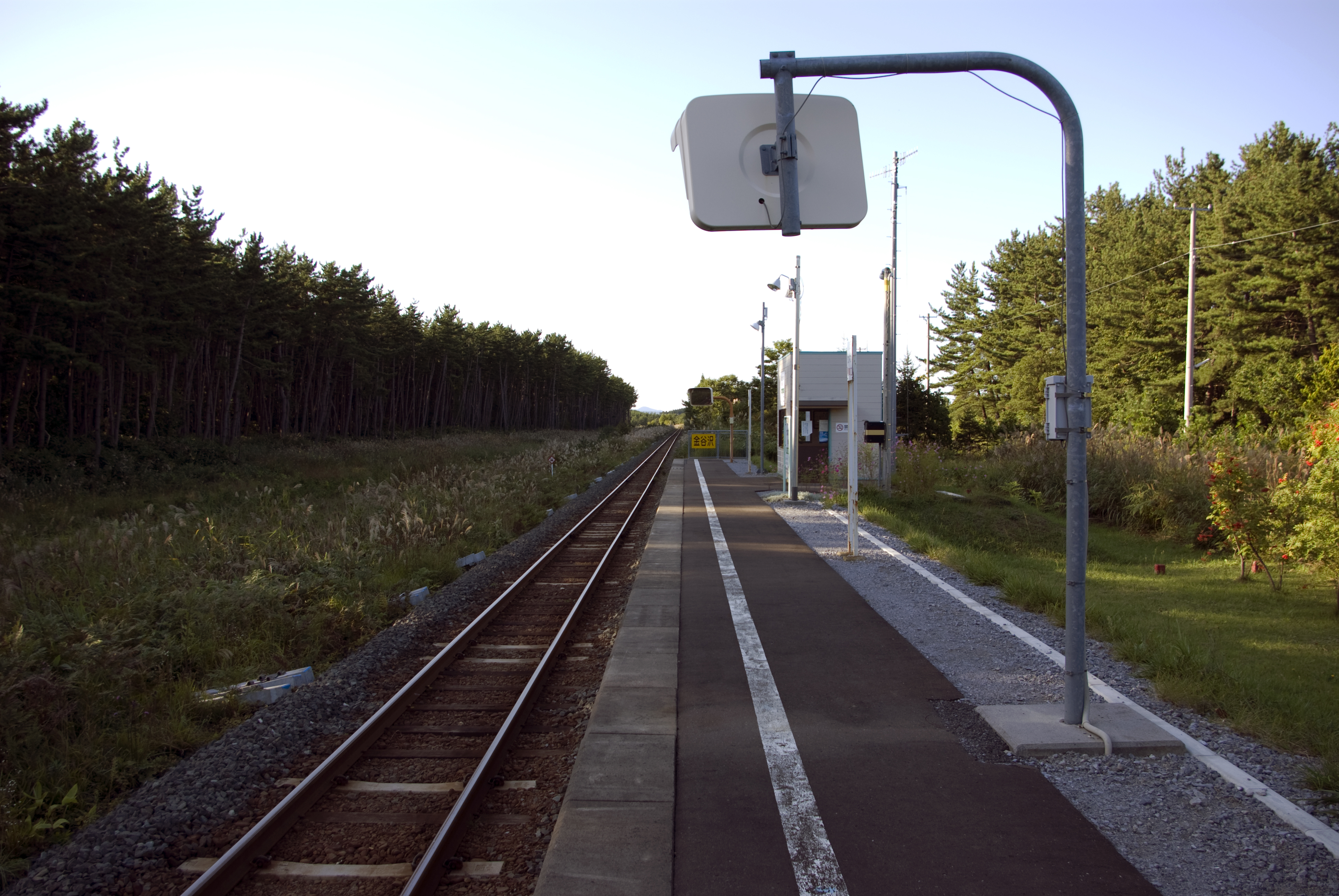 JR大湊線金谷沢駅